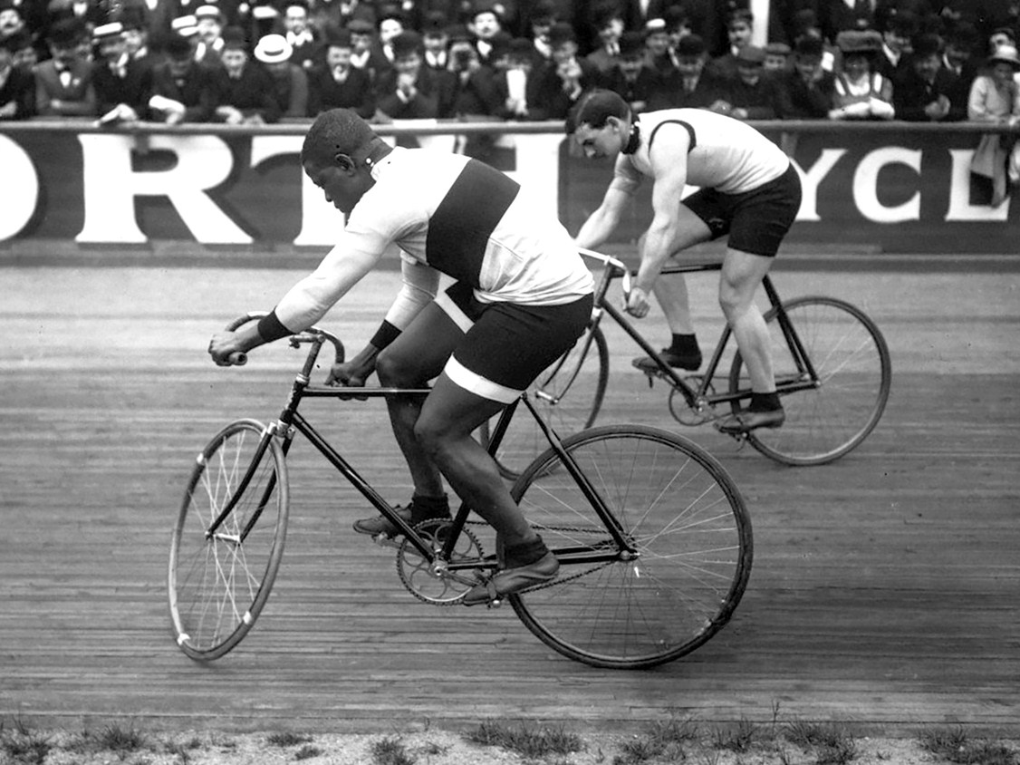 Major Taylor et Léon Hourlier,[1] Buffalo [cyclisme sur piste] : [photographie de presse] / [Agence Rol]